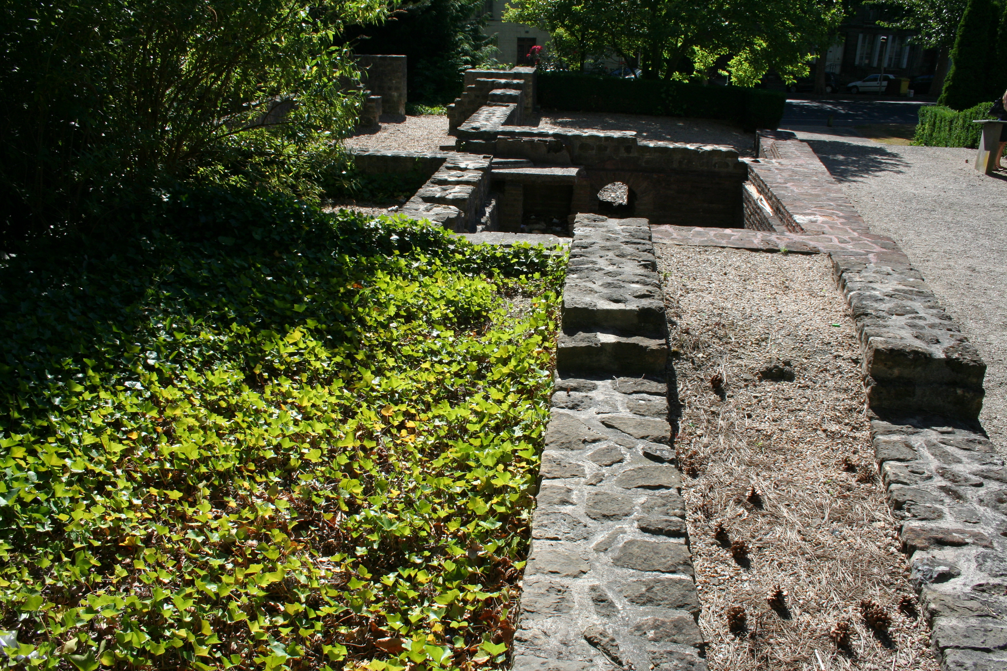 vue générale des vestiges villa, jardin de l'hopital de Lisieux